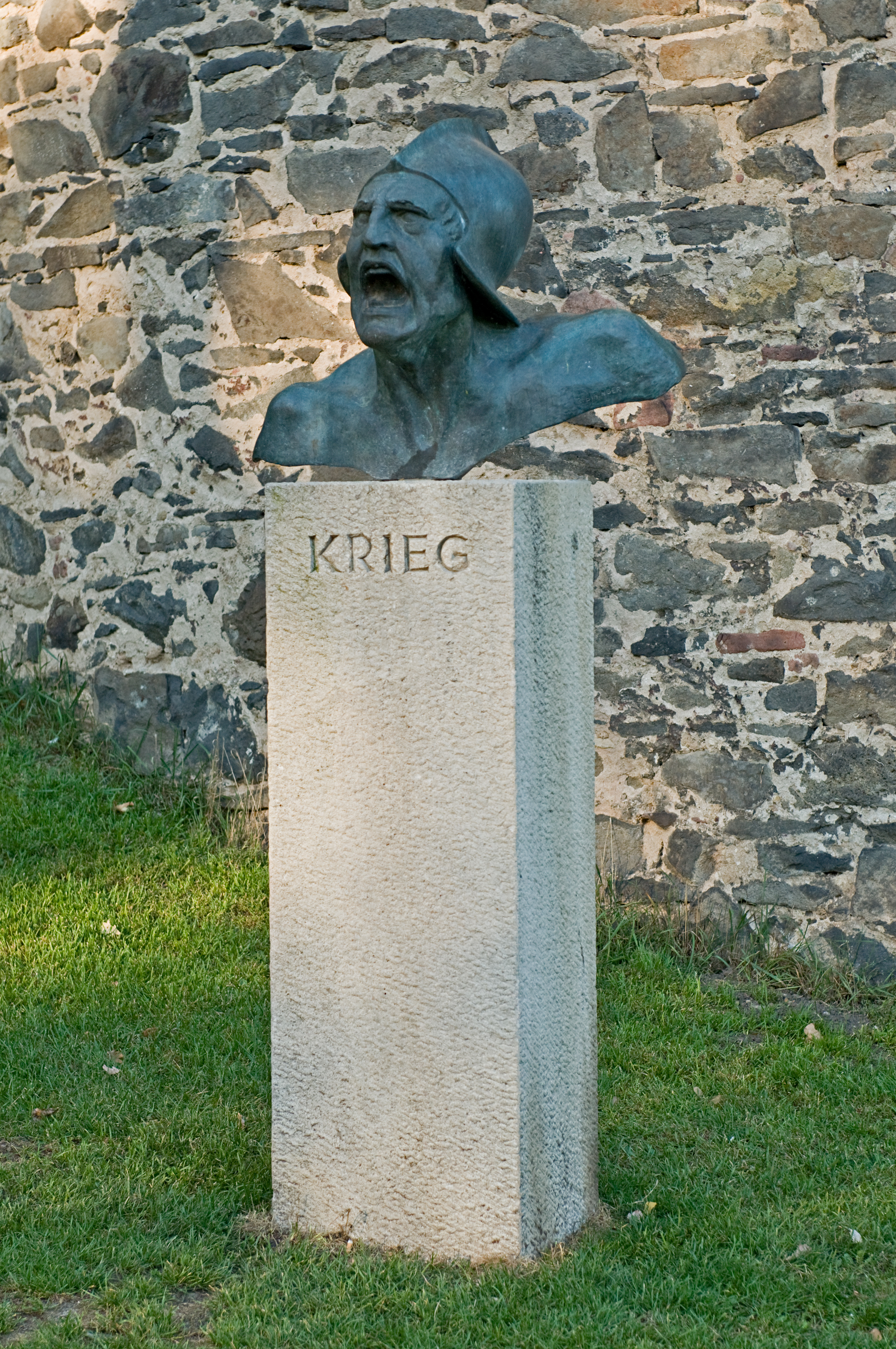 Bronzeplastik „Krieg“ von Richard Biringer in Frankfurt-Höchst Gesamtansicht